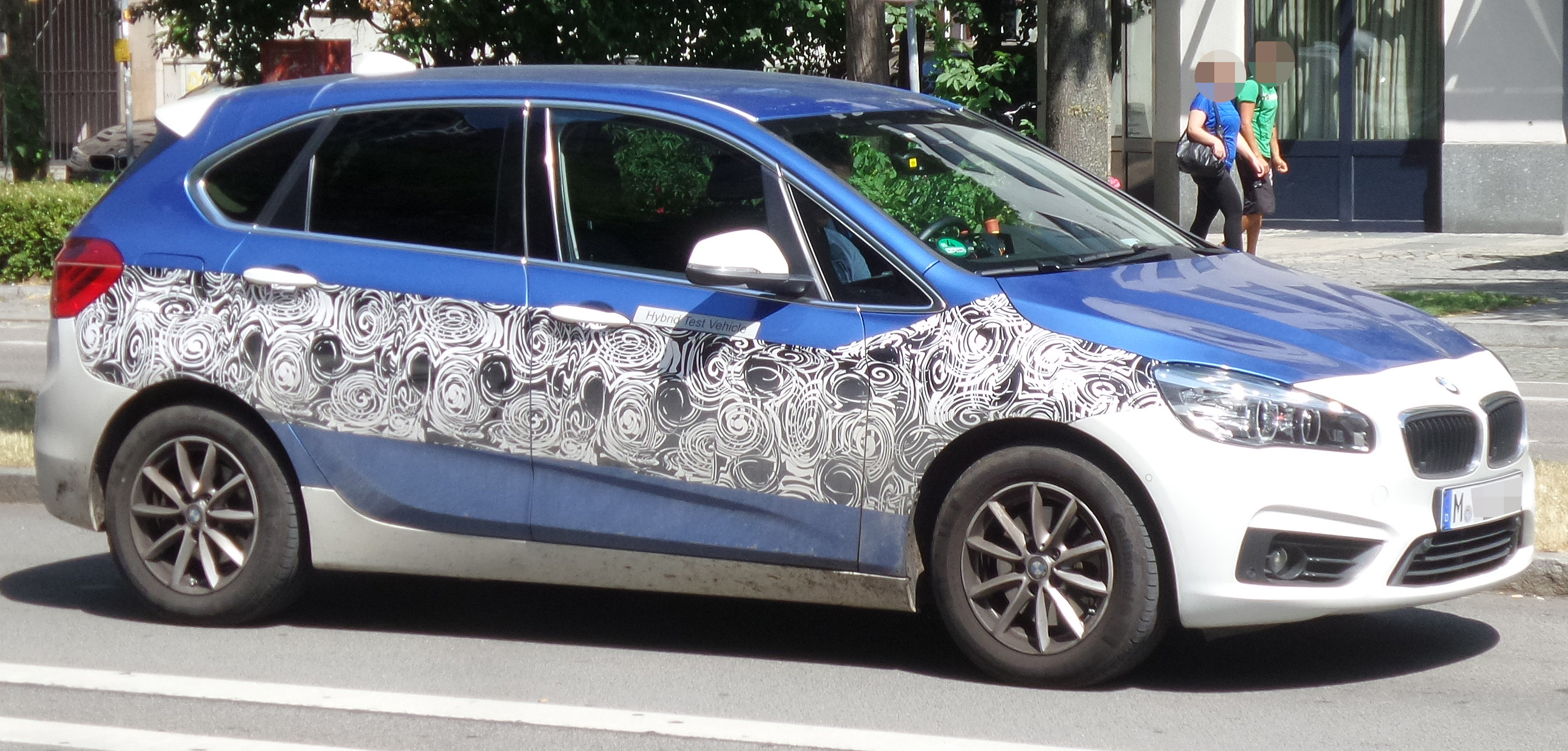 BMW F45 (2er Active Tourer) Hybrid Test Vehicle